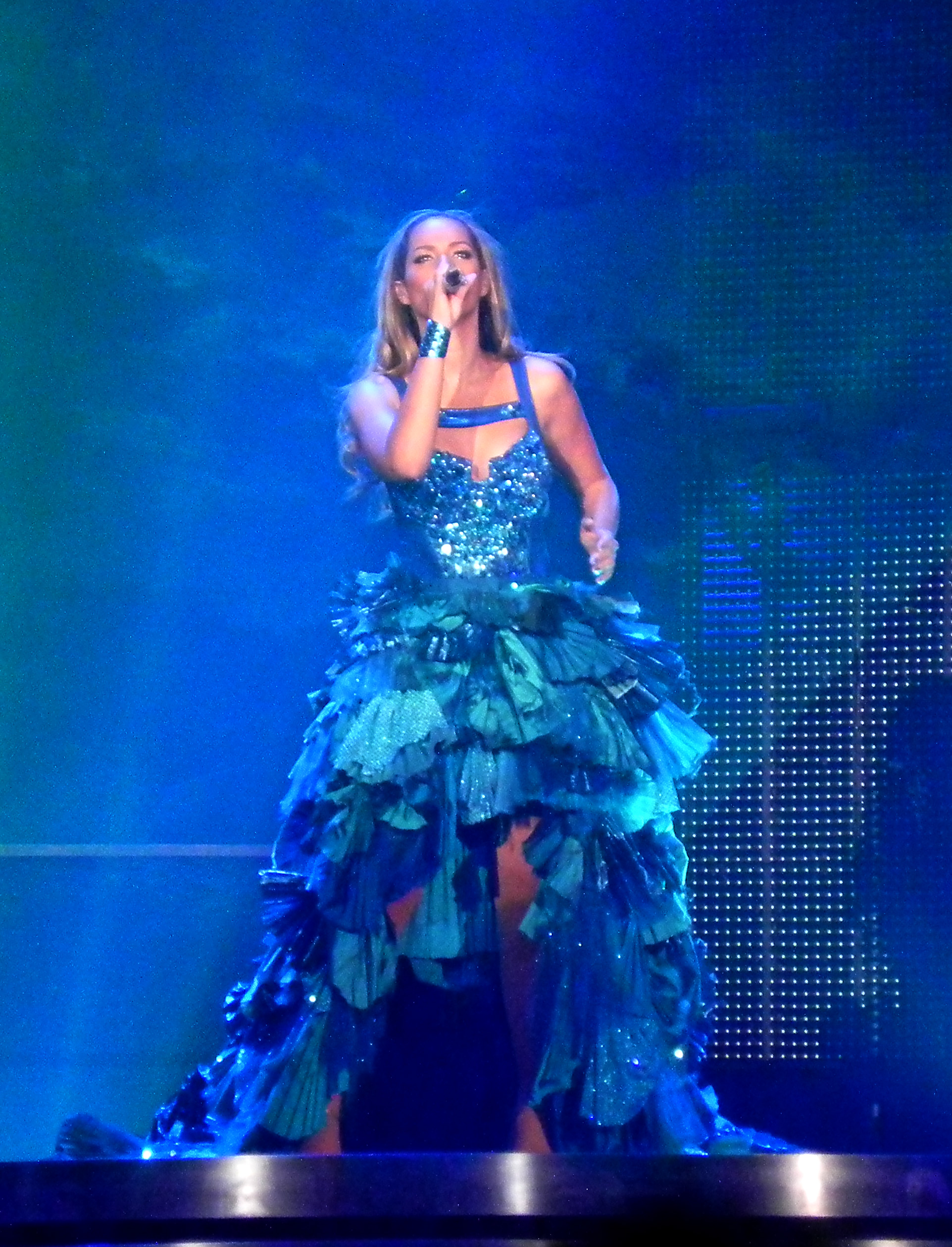 Leona 076-sRGB